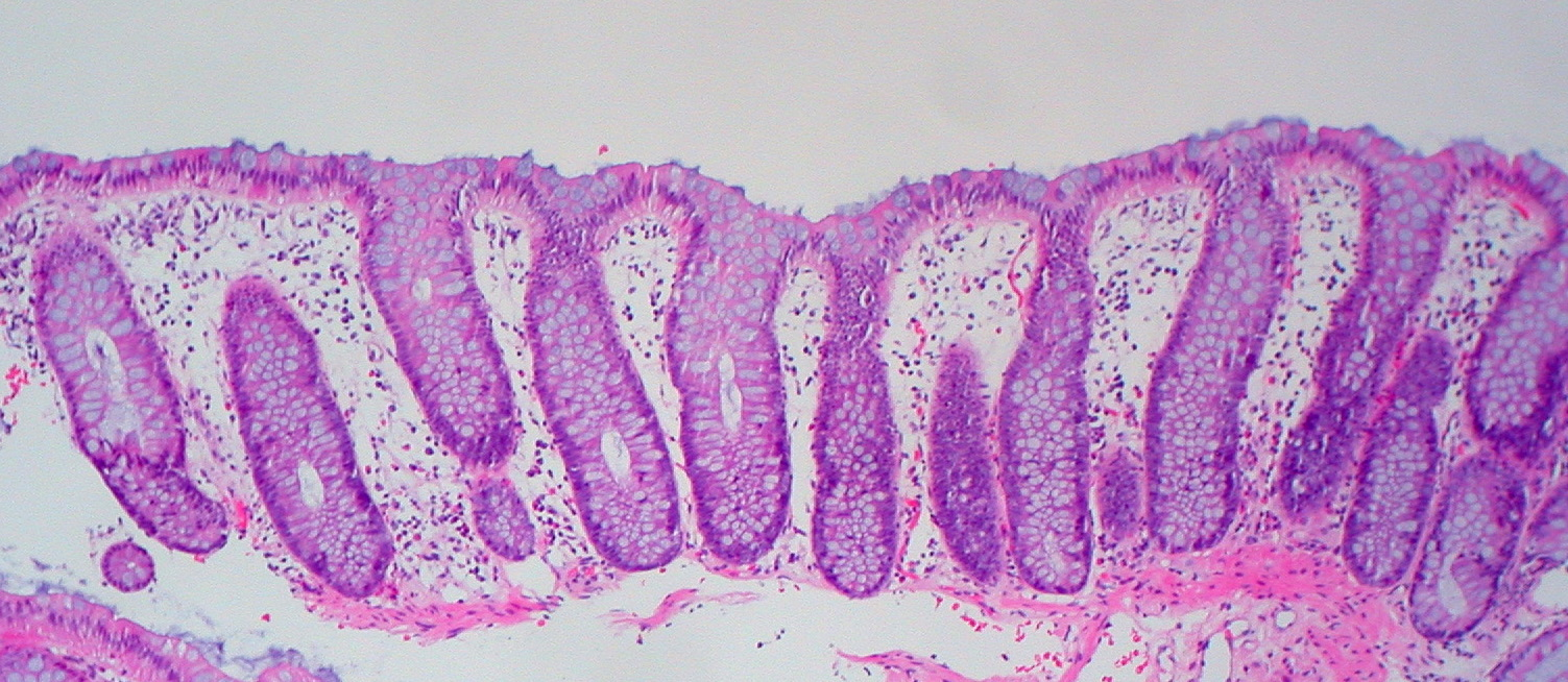 Normal colonic mucosa